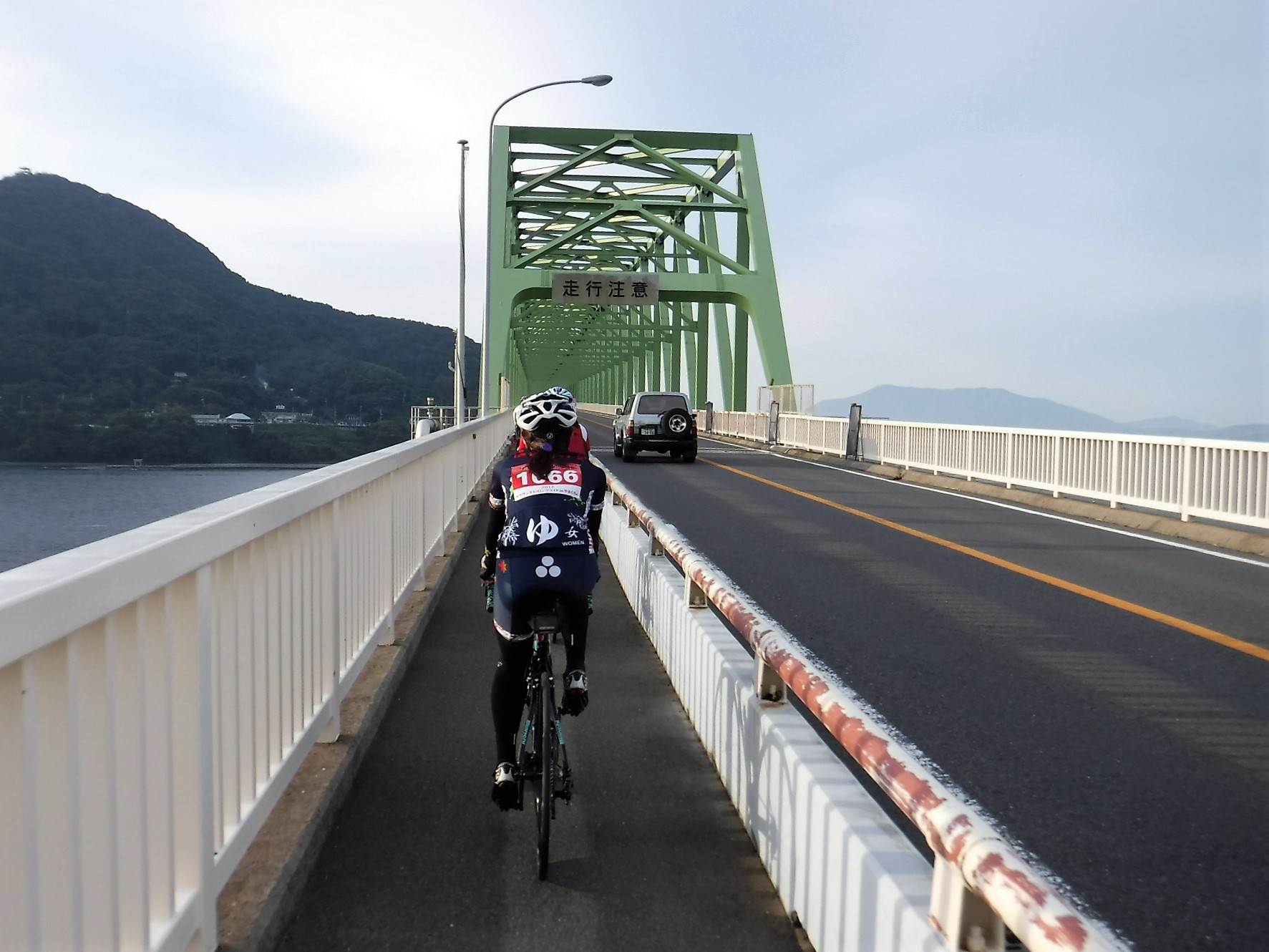 2017年、山口県柳井市で開催された、サザンセトロングライド。周防大橋。